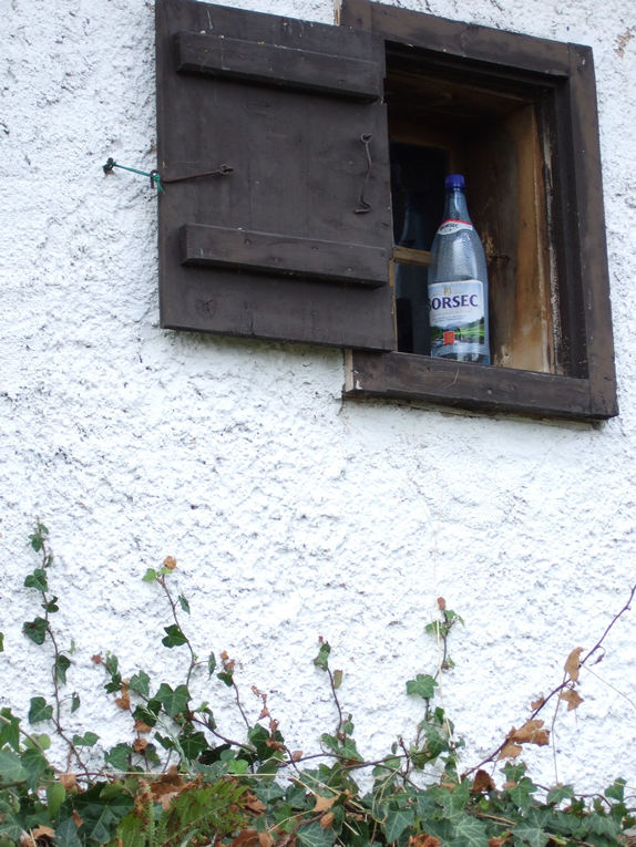 Bălceşti, Roumanie, jud. Cluj